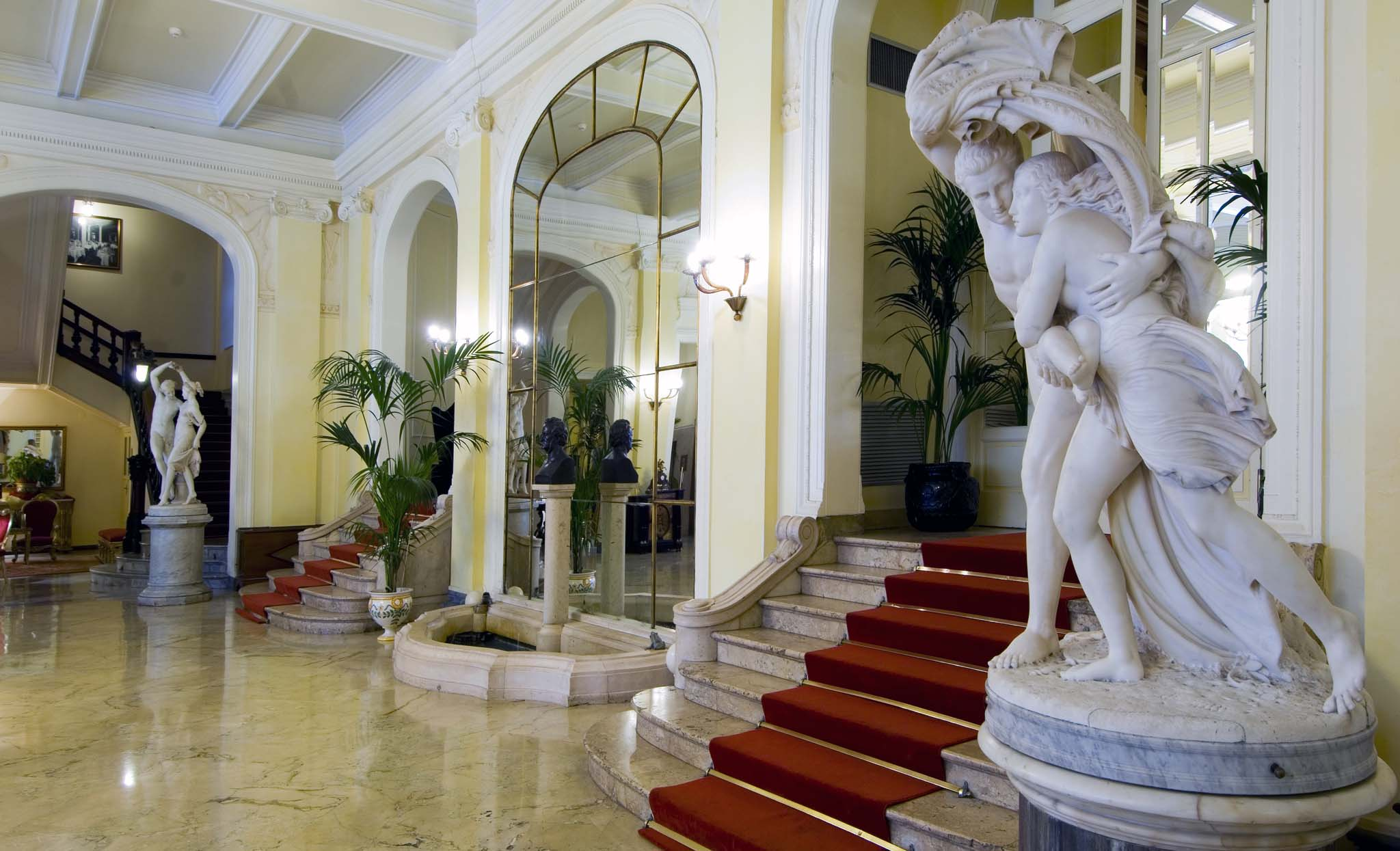 Hall Dell'albergo